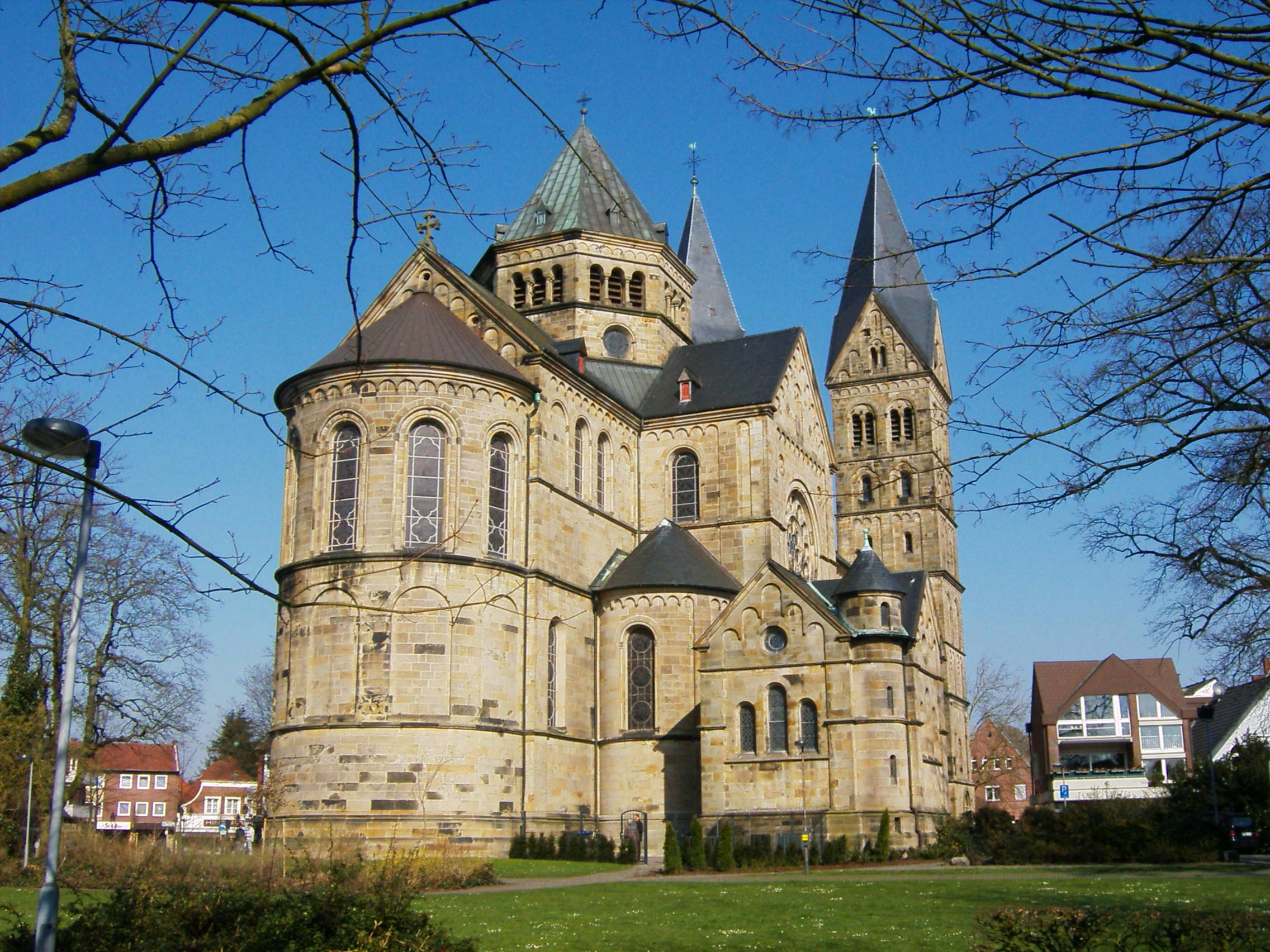 St. Anna Kirche in Neuenkirchen, Südansicht